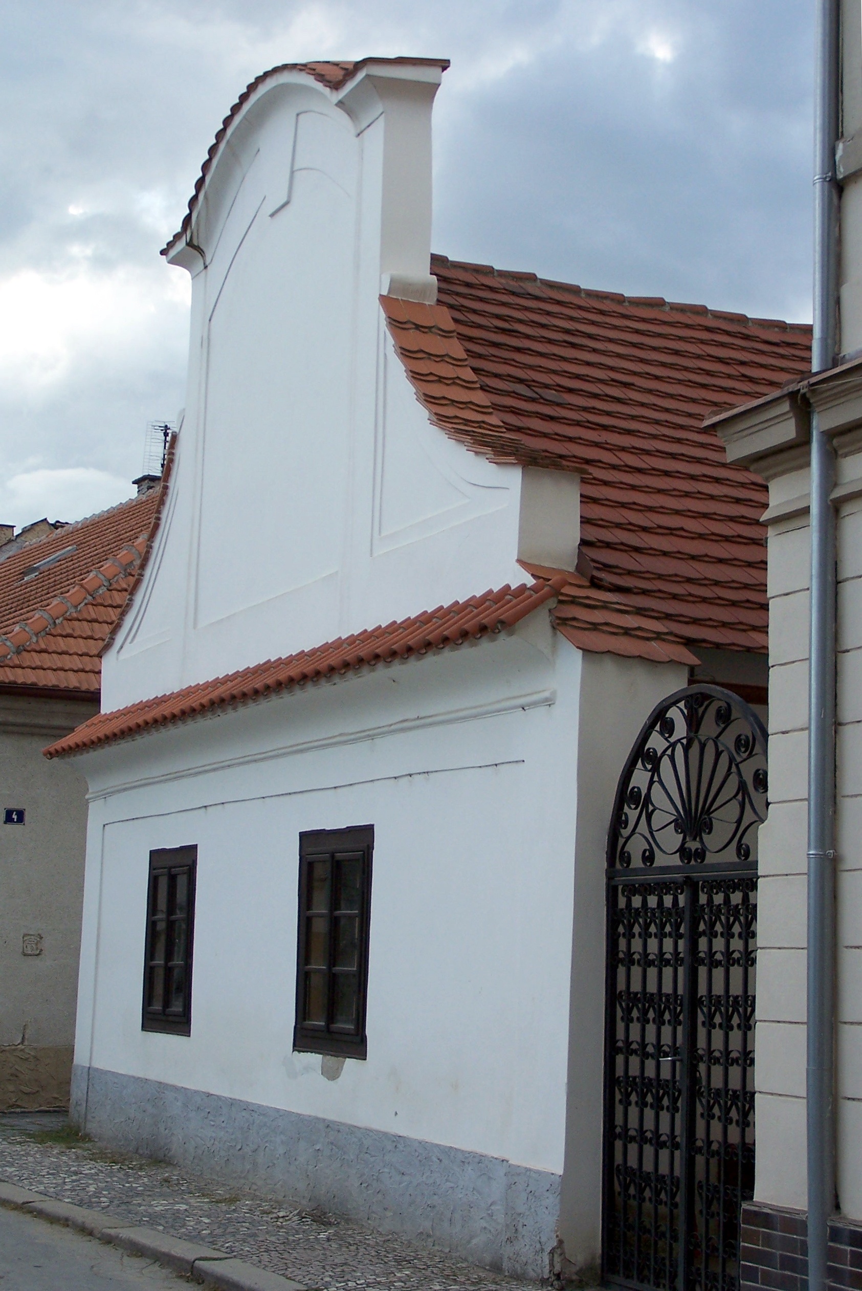 Špitál Kunhuta v Poděbradech